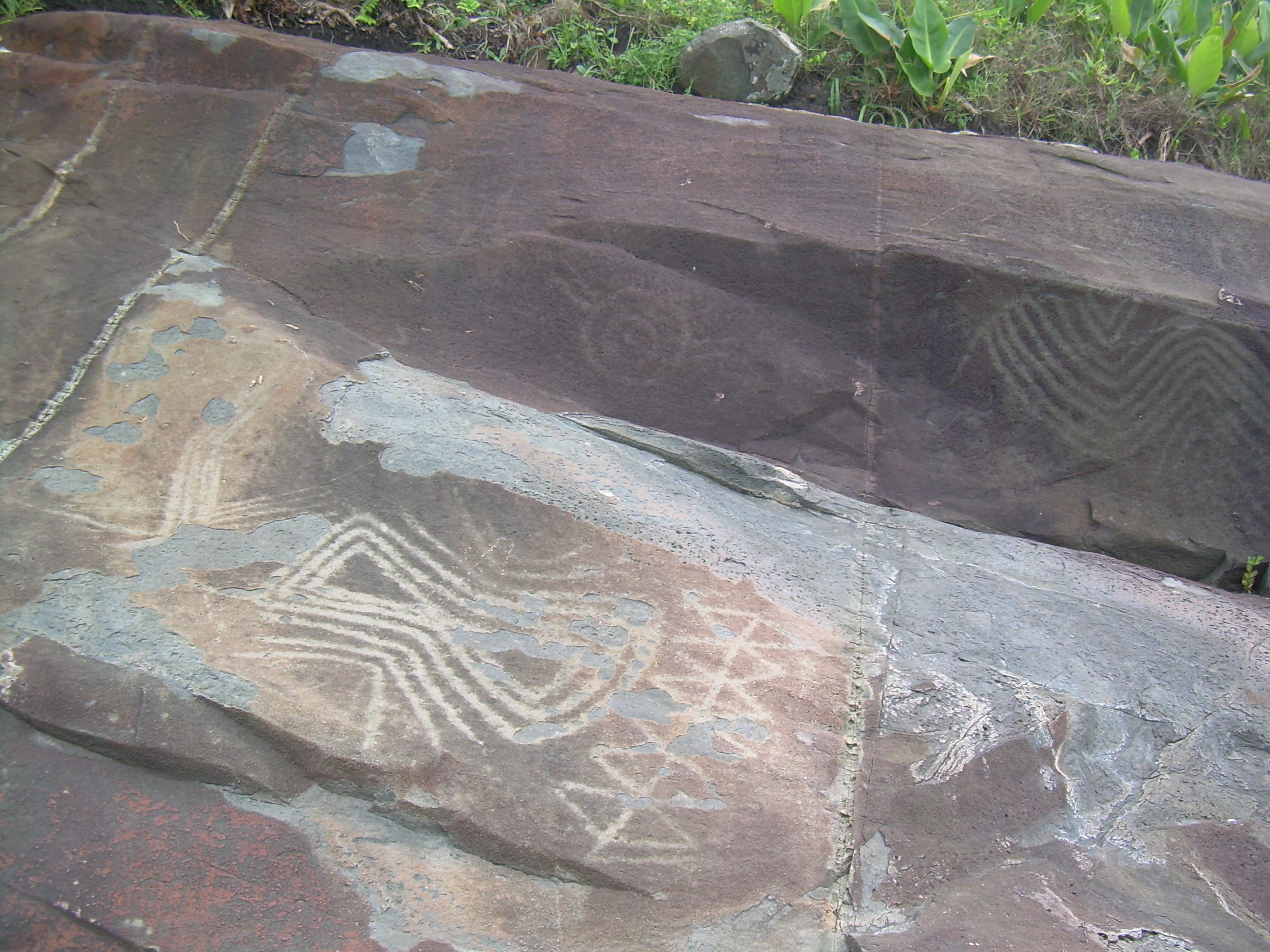 Arte rupestre na praia do Costão do Santinho, Florianópolis.